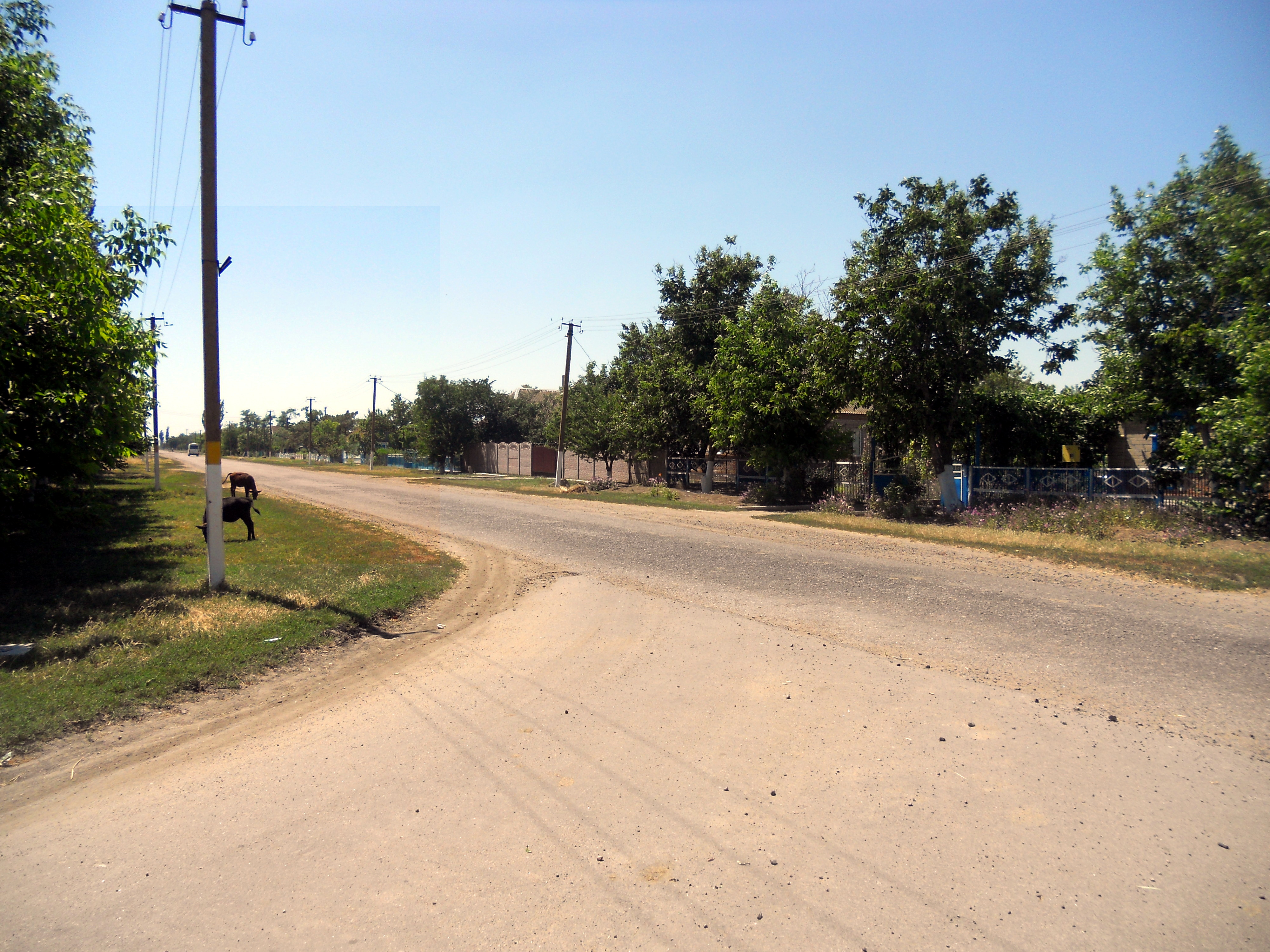 Орлівка Приморський район, центральна вулиця села, колишня Леніна